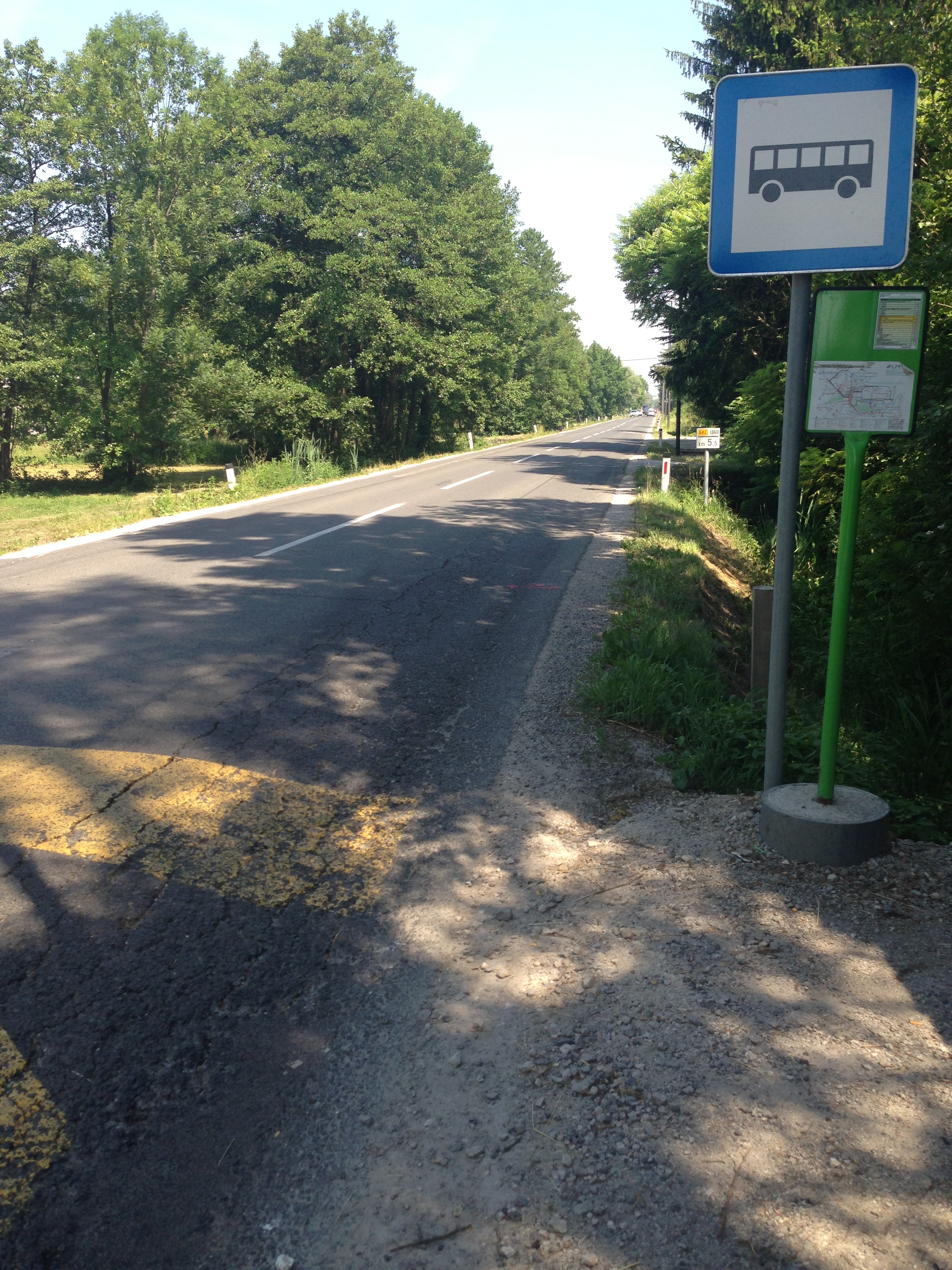 Ižanska cesta pri postajališču Ižica (604061) v smeri centra.